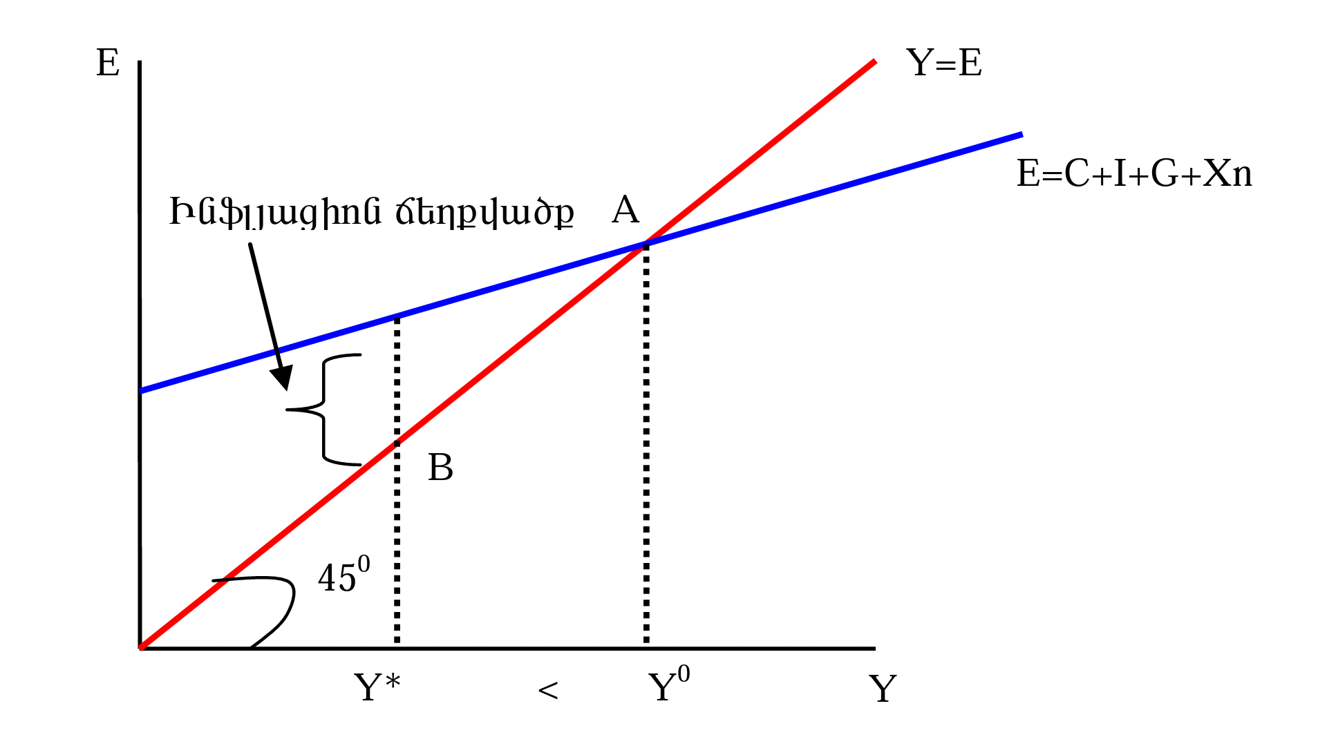 Ինֆլացիոն ճեղքվածք